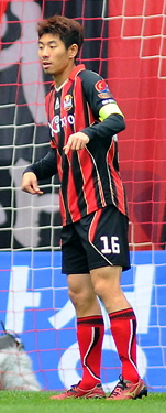 FC 서울 하대성